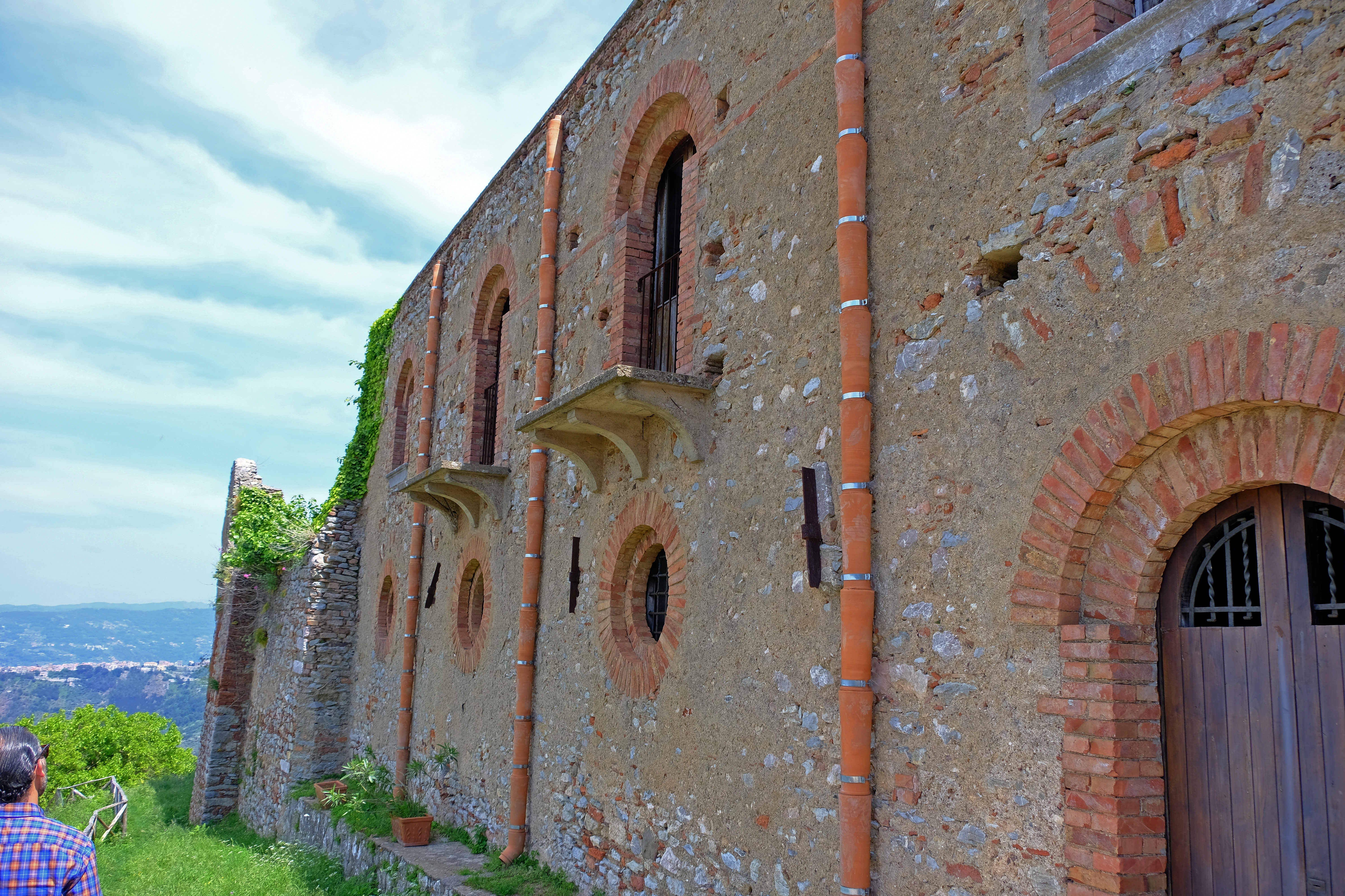 Convento di San Filippo di Fragalà